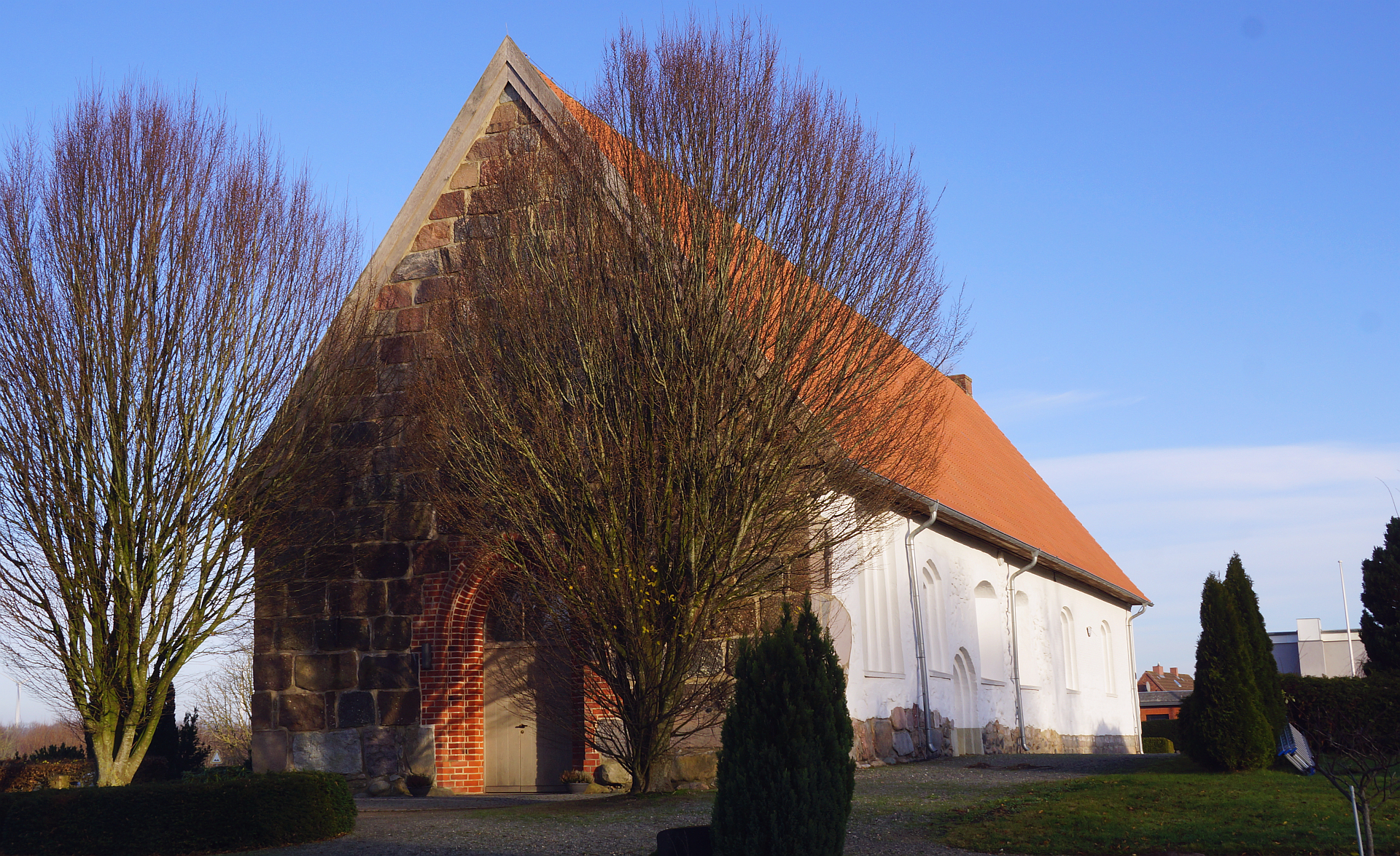 Böklund Feldsteinkirche mit einer Natursteinquader-Fassade & Mauerwerksportal & -verlängerung Foto 2018 Wolfgang Pehlemann DSC04310